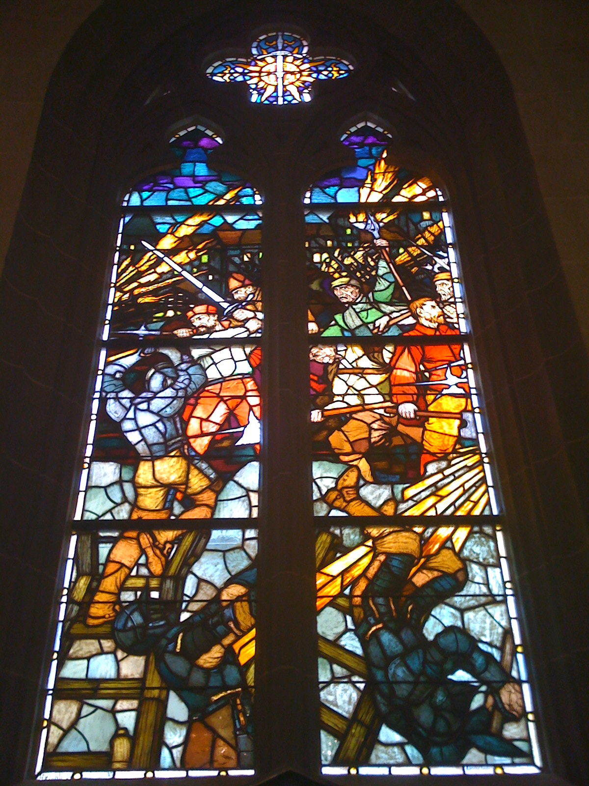 Vitrail dans la chapelle de l'Escalade du temple de Saint-Gervais à Genève (Suisse)